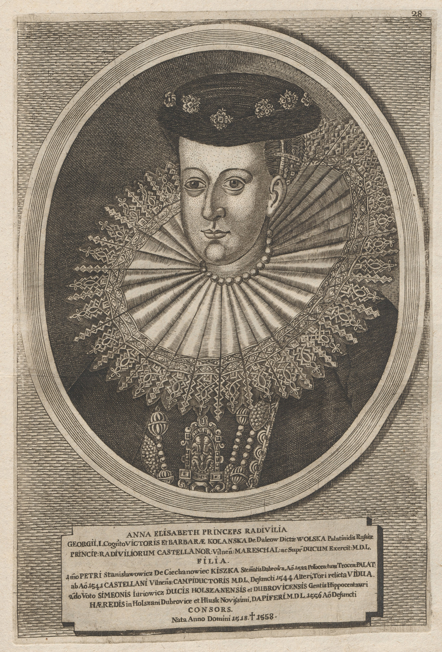 Беларуская (тарашкевіца): Партрэт Ганны Альжбеты Гальшанскай (Hanna Alžbieta Halšanskaja) з роду Радзівілаў (Radzivił)